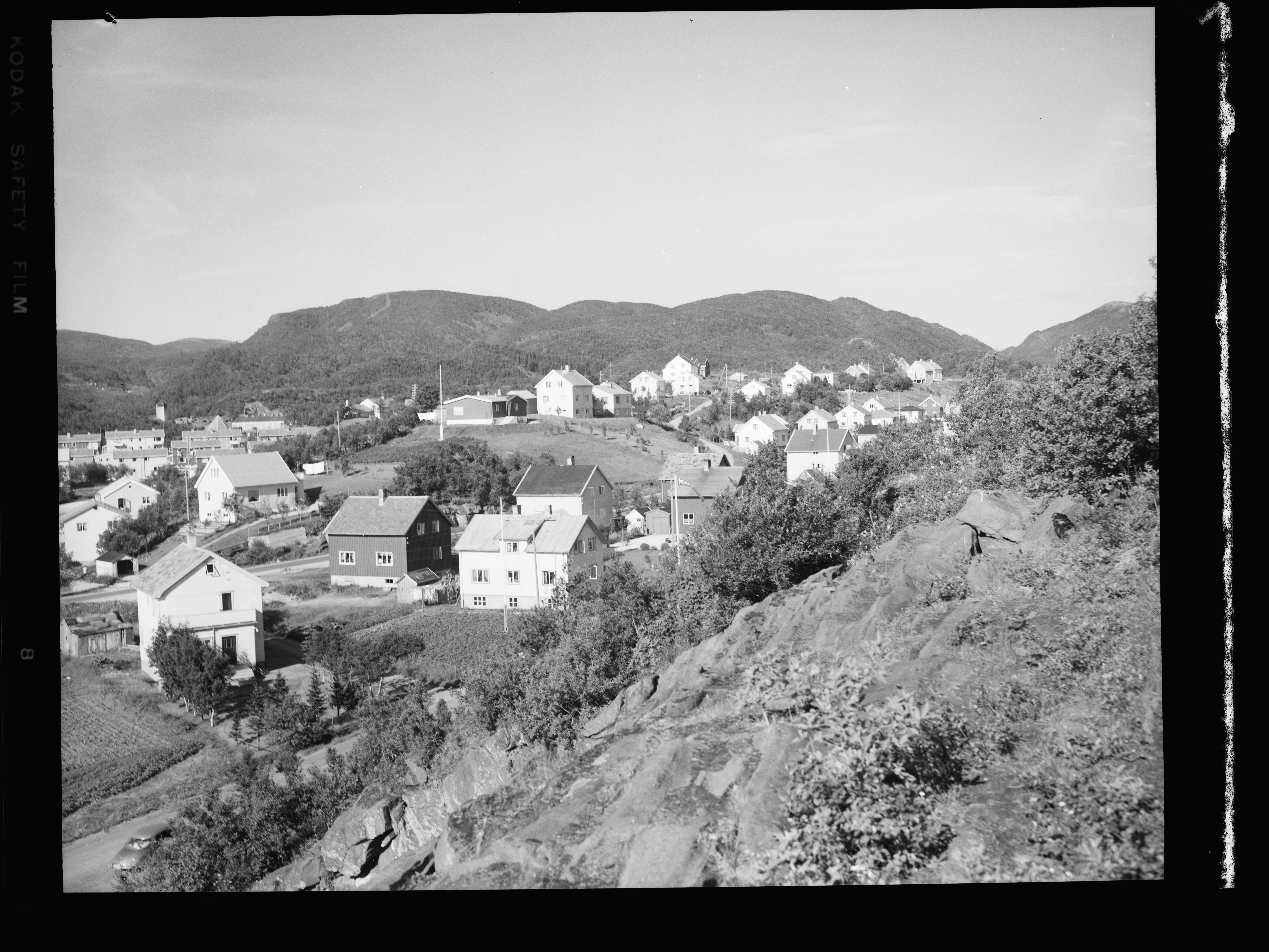 Bildet er hentet fra Nasjonalbibliotekets bildesamling. Anmerkninger til bildet var: Fotograf: L.S Bodin, Bodø, Nordland